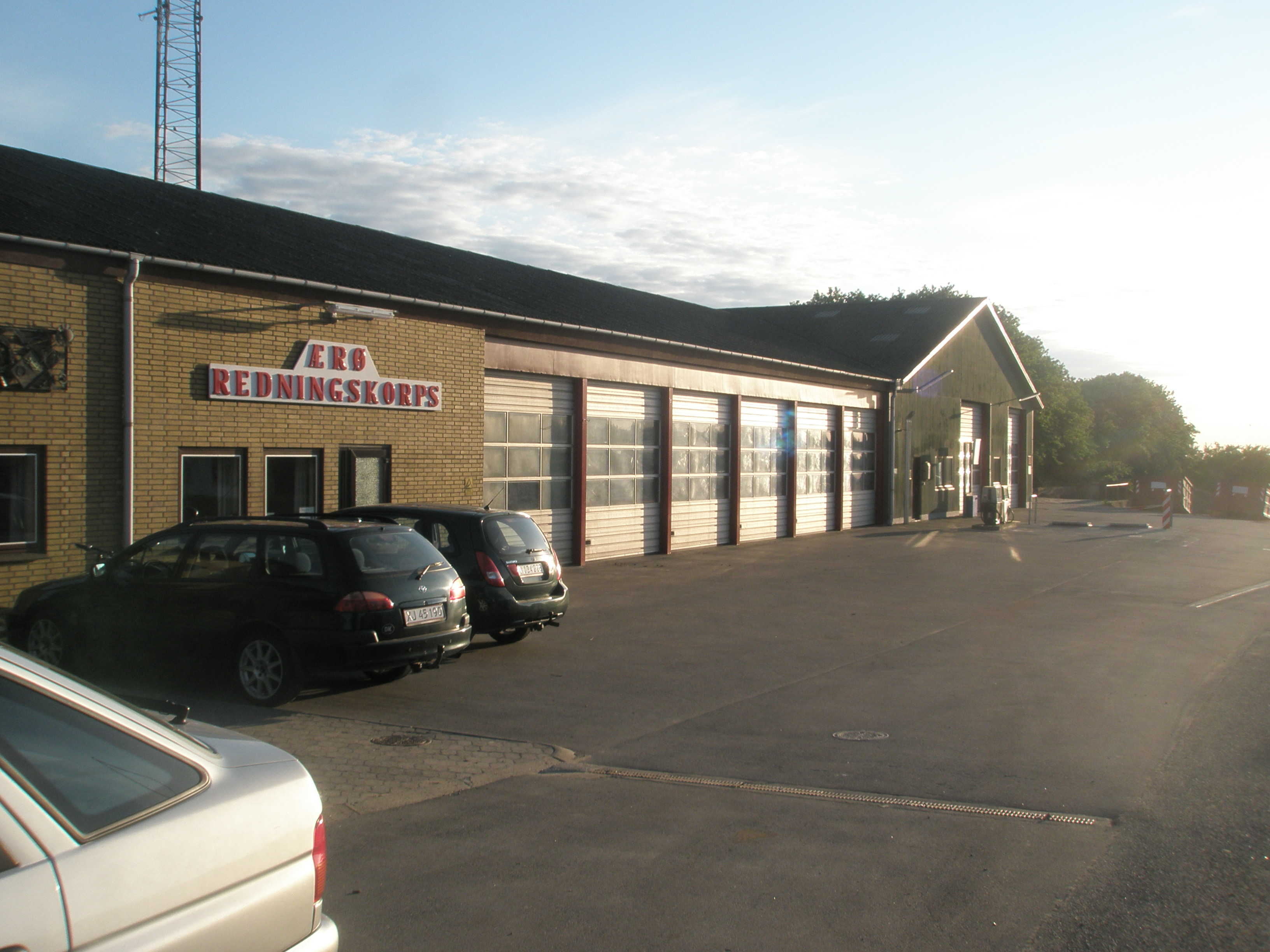 Ærø Redningskorps i Dunkær